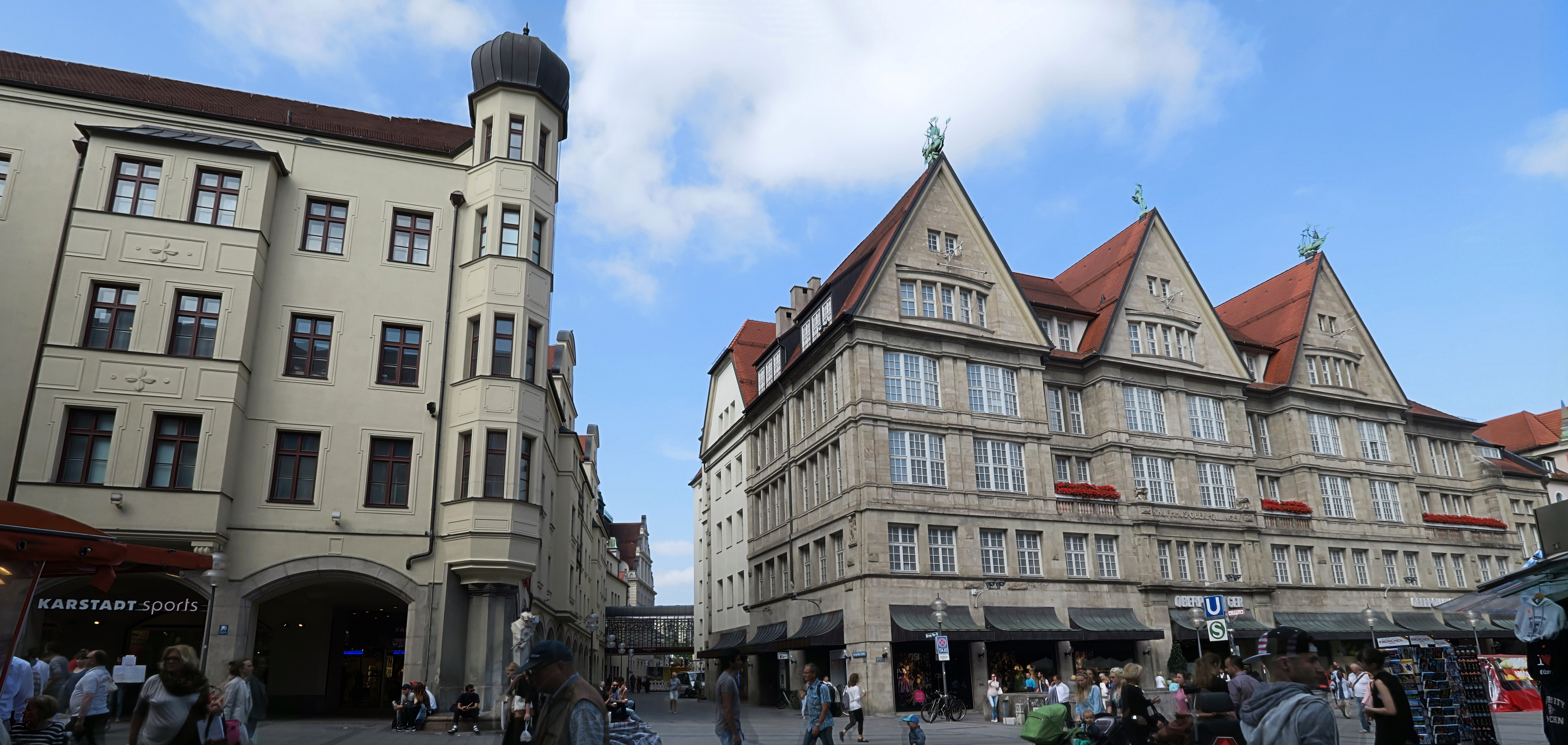 Deutschland, Bayern, Oberbayern, München, Altstadt, Kaufhäuser KARSTADT sports sowie Oberpollinger